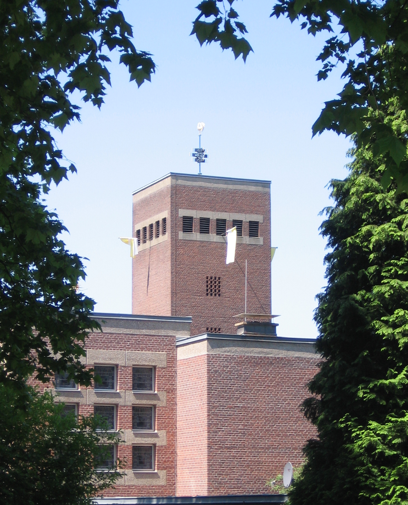 Katholische Kirche Hl. Drei Könige in Leverkusen-Bergisch Neukirchen